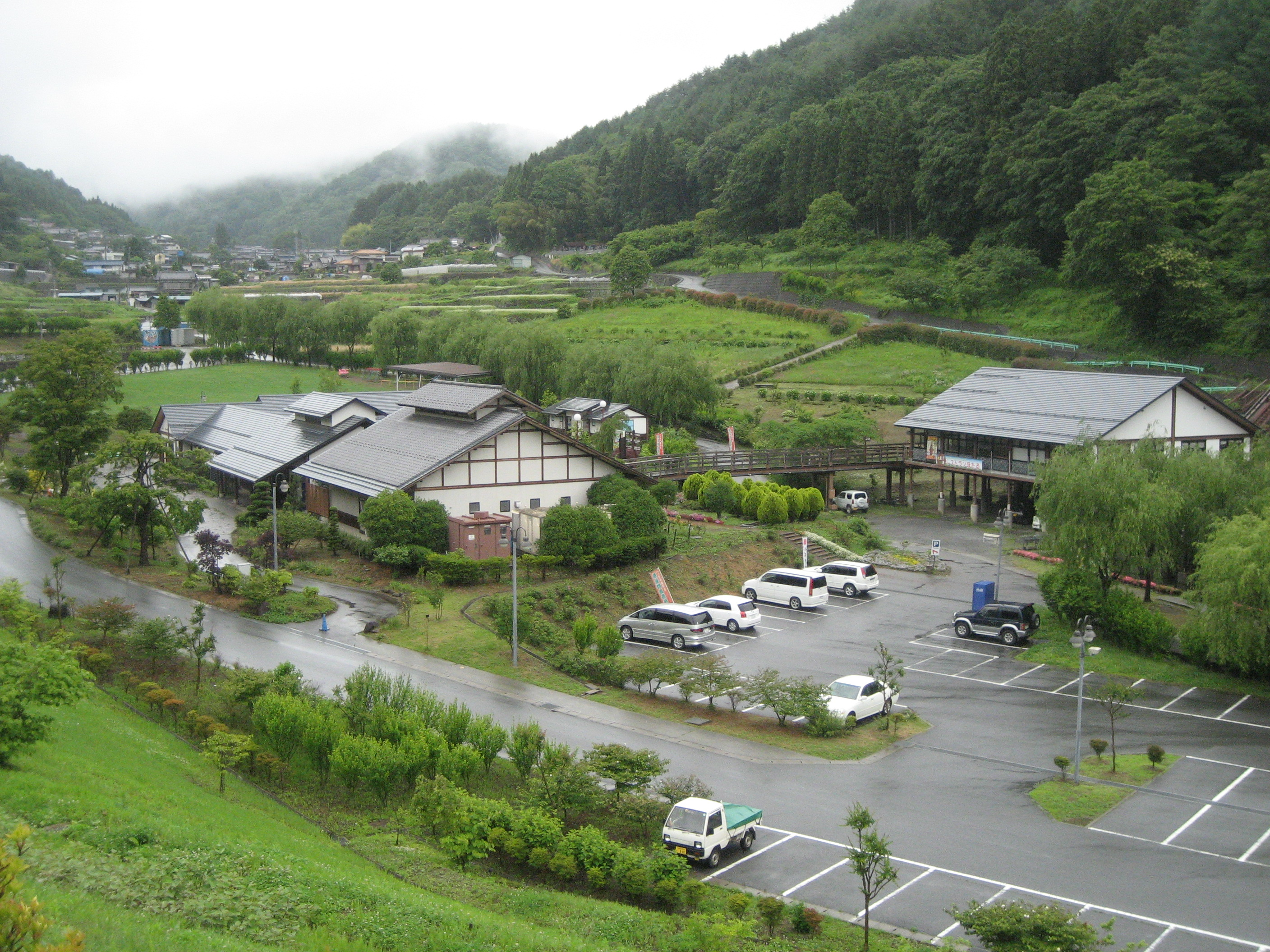 道の駅南きよさと駅舎１